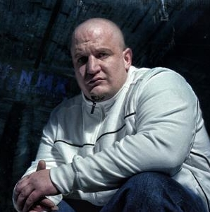 Medizin Mann und MC Bogy (2011)